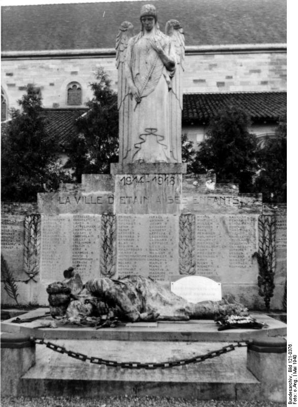 frz. Kriegerdenkmal (1914- 18) in Etain